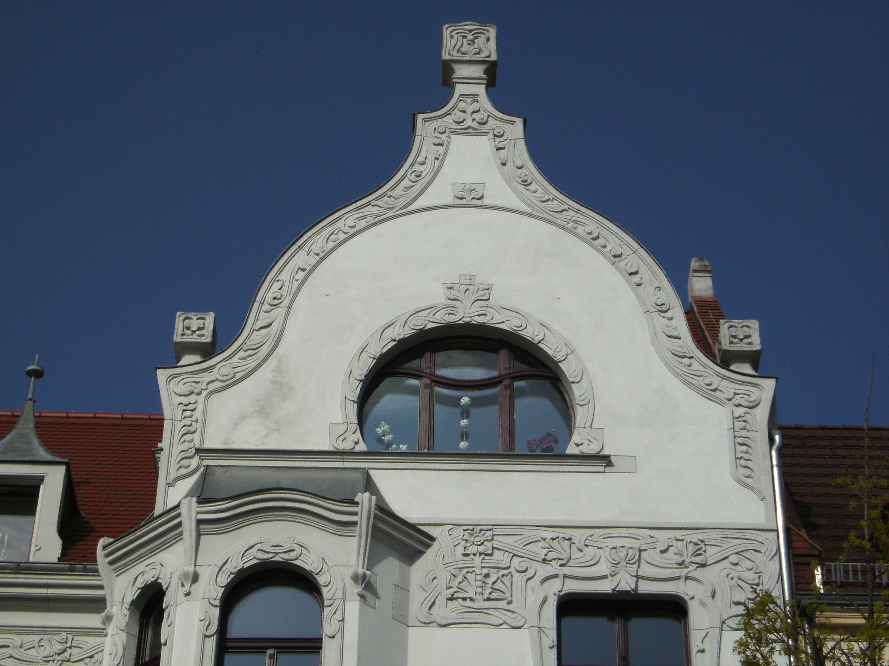 Schillerstraße 48